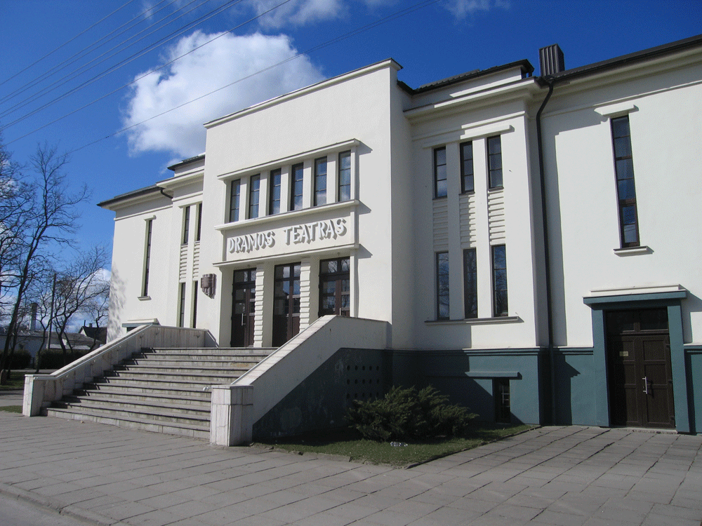 Marijampolė Theatre